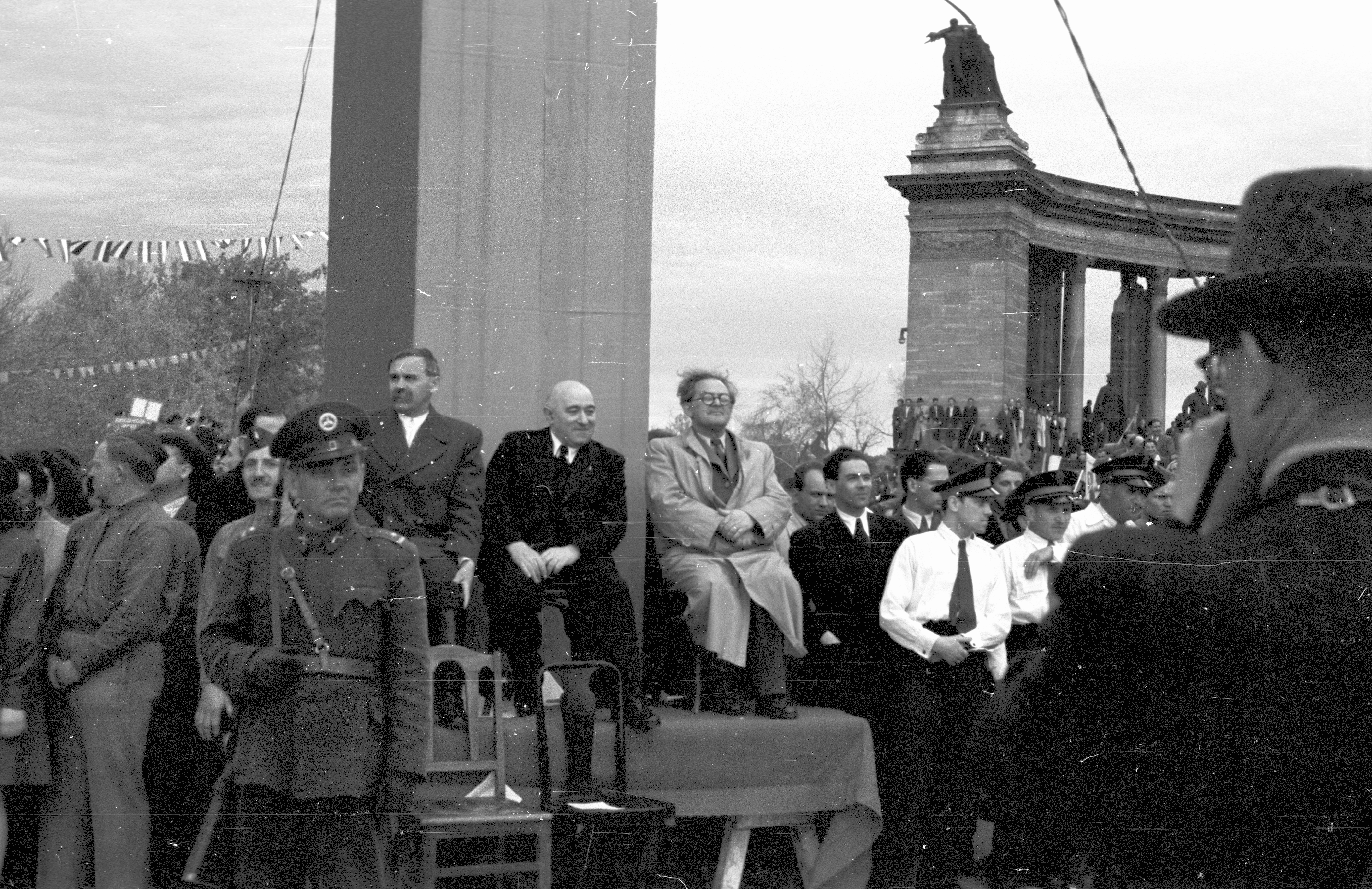 Hősök tere, május 1-i ünnepség. Az emelvényen Veres Péter, Rákosi Mátyás, Szakasits Árpád. Location: Hungary, Budapest XIV. Tags: Budapest Title: Hősök tere, május 1-i ünnepség. Az emelvényen Veres Péter, Rákosi Mátyás, Szakasits Árpád.